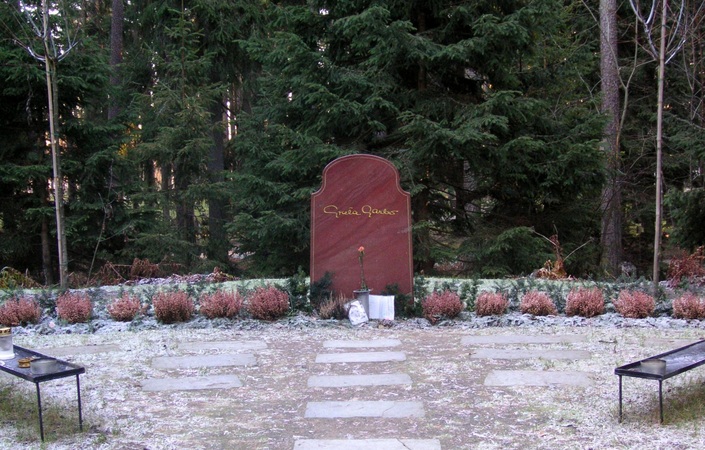 Greta Garbos grav på Skogskyrkogården i Stockholm